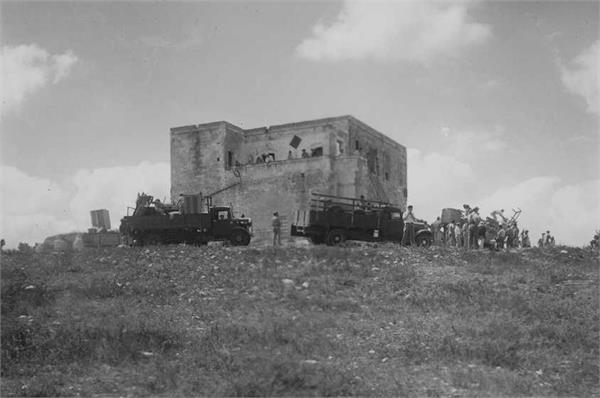 הבניין הערבי הישן (ג'וערה) בעין-השופט